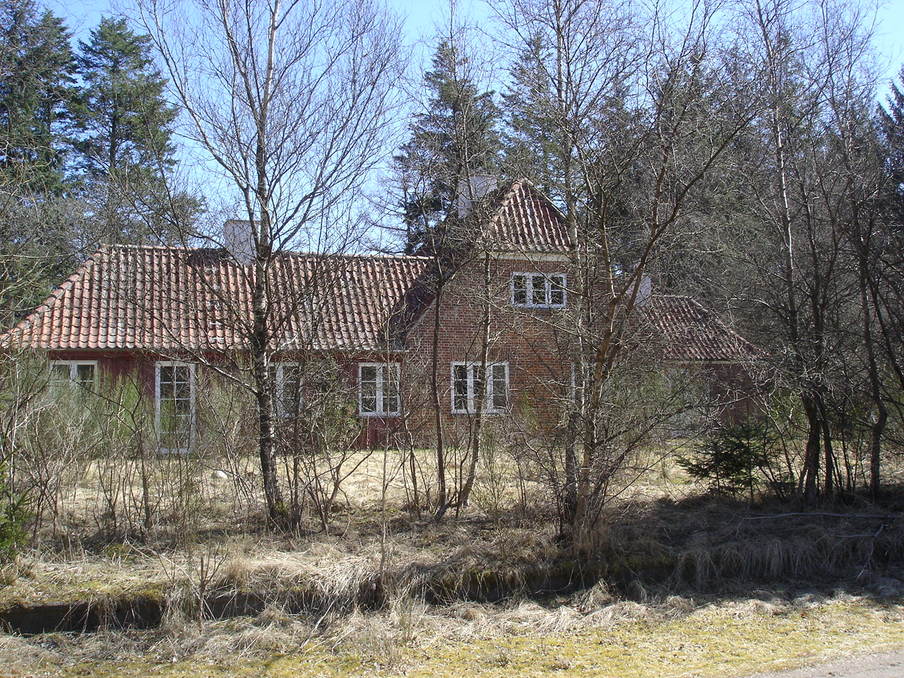 Hjøllund Station fra sporsiden